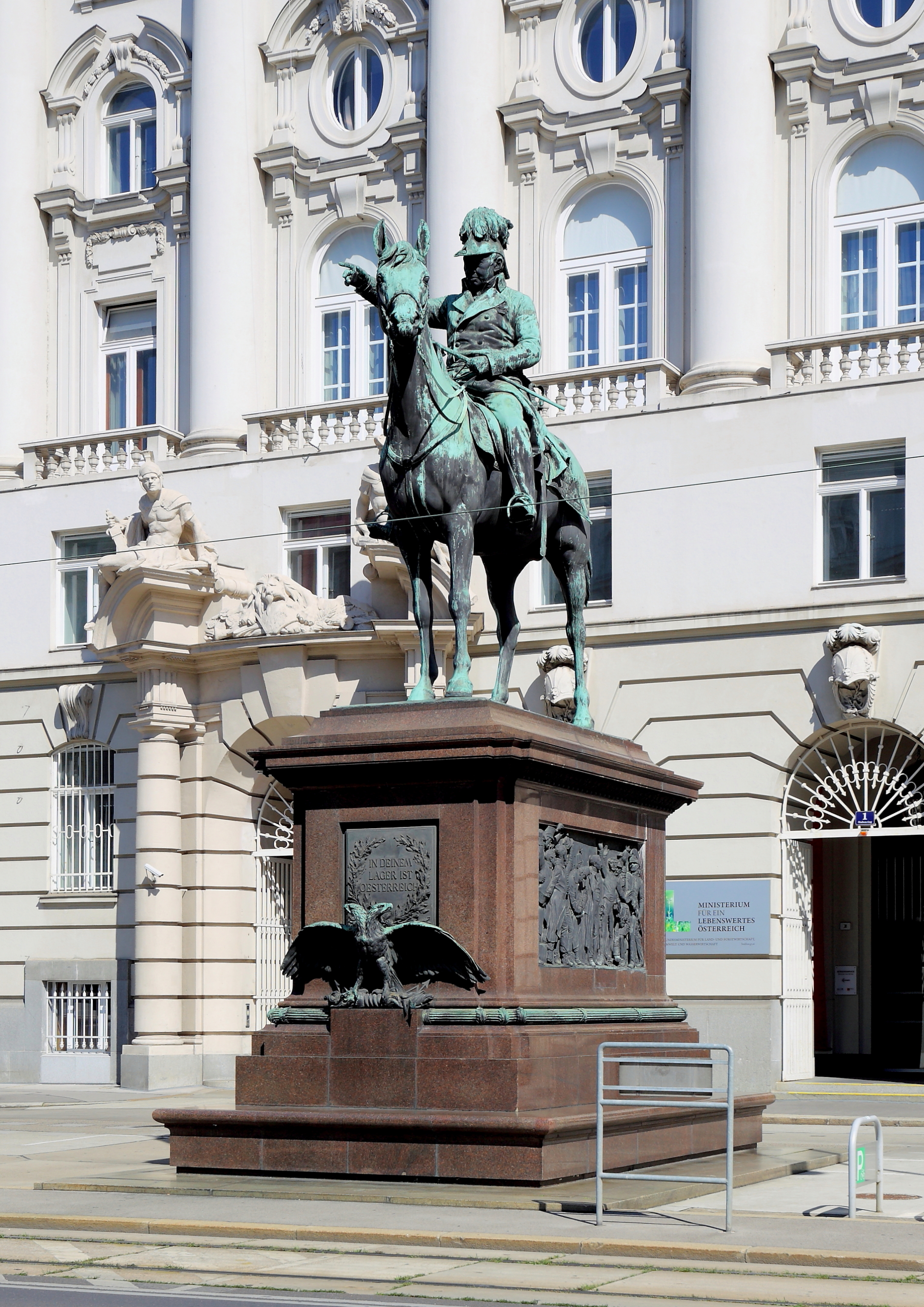 Das Radetzky-Reiterstandbild vor dem Regierungsgebäude (ehem. K.u.k. Kriegsministerium) am Stubenring 1 in der österreichischen Bundeshauptstadt Wien.Das Denkmal für Feldmarschall Johann Joseph Wenzel Graf Radetzky von Radetz (1766–1858) gab 1886 Erzherzog Albrecht in Auftrag und wurde von Caspar von Zumbusch in den Jahren von 1886 bis 1892 errichtet. Der Sockel wurde nach den Plänen des Architekten George Niemann ausgeführt. Die Reliefs links und rechts am Sockel sind Werke von Hans Bitterlich und zeigen Radetzky beim Kriegsrat im Kreise seiner Generäle sowie Vater Radetzky mit Soldaten. An der Vorderseite des Sockel befindet sich ein bronzener Doppeladler und darüber eine Tafel mit den berühmten Worten von Franz Grillparzer: "In deinem Lager ist Österreich". Ursprünglich war der Standort des Reiterstandbildes vor dem ehemaligen Hofkriegsratsgebäude Am Hof (Enthüllung am 24.4.1892), 1912 wurde es vor das neu errichtete Kriegsministerium am Stubenring versetzt.